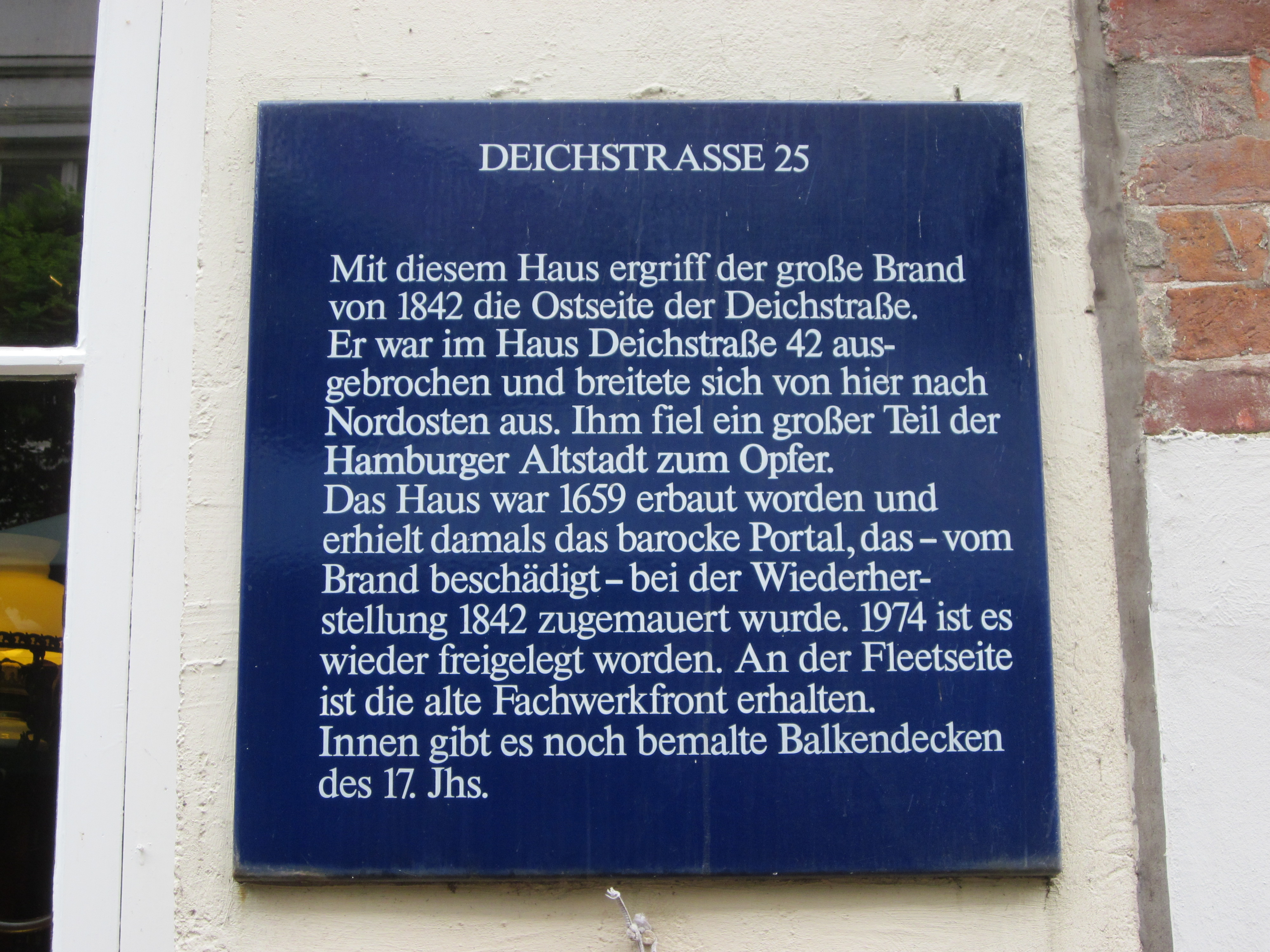 Tafel am denkmalgeschützten Haus Deichstraße 25 in der Hamburger Altstadt. This is a photograph of an architectural monument.